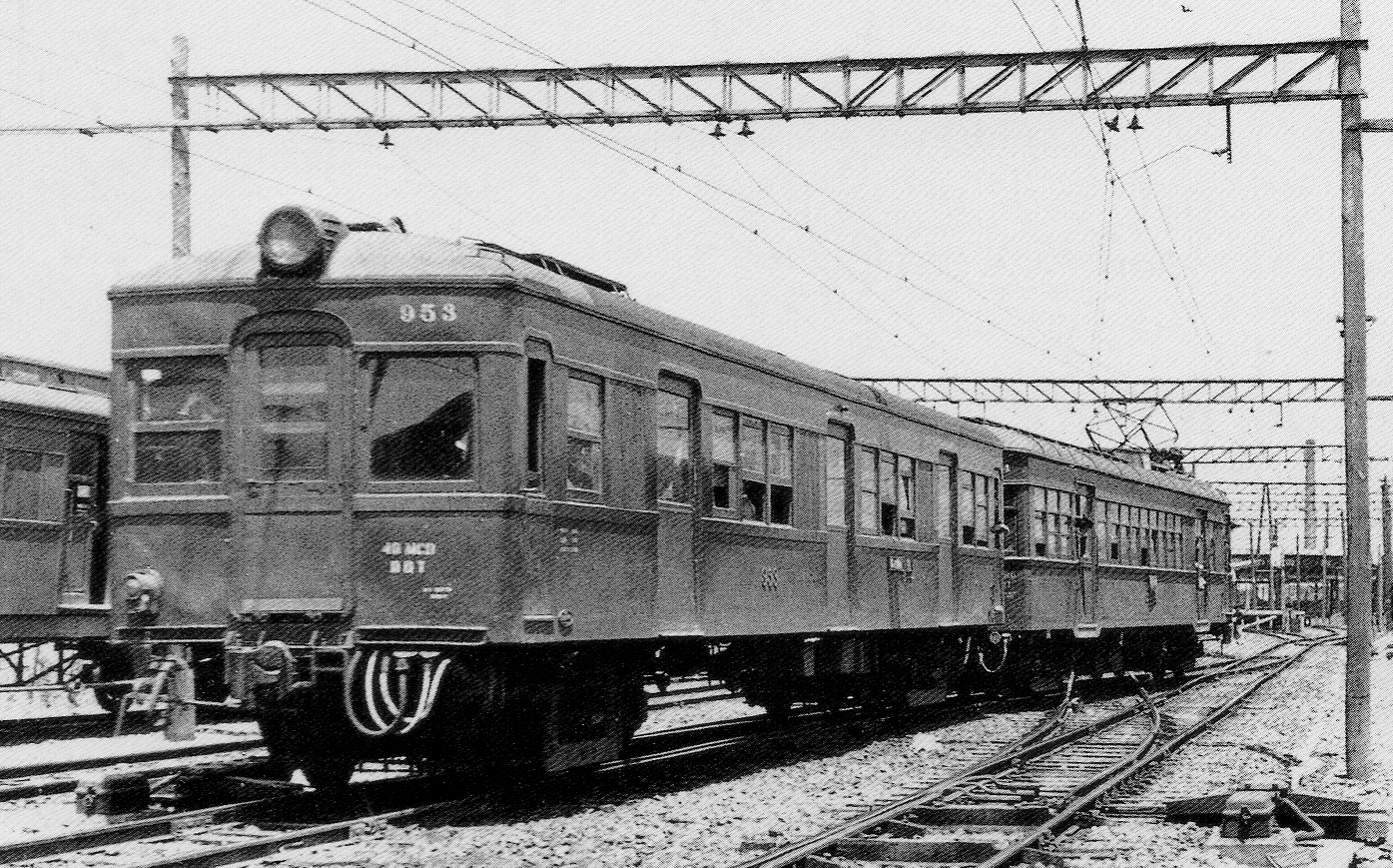 神宮前に到着するモ3604＋ク953の河和線ローカル列車。